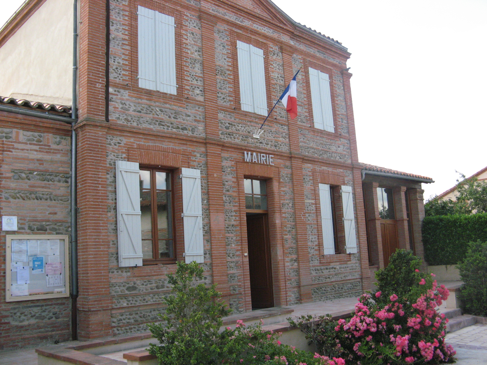 Mairie de Bretx